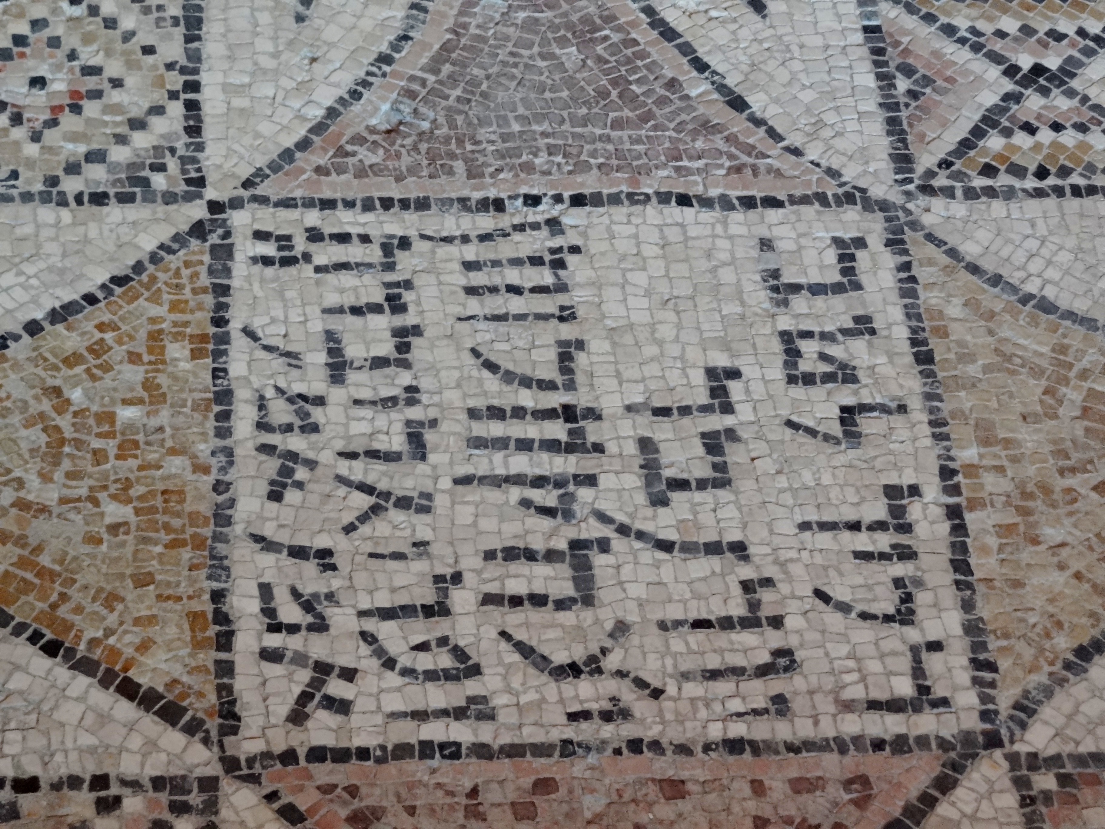 Zippori - The i synagogue בית הכנסת העתיק של ציפורי כתובת בארמית המציינת את התורמים לבית הכנסת דכיר לטב (זכור לטוב) יודן בר יצחק הכוהן ופריגרי ברתה (בתו) אמן אמן